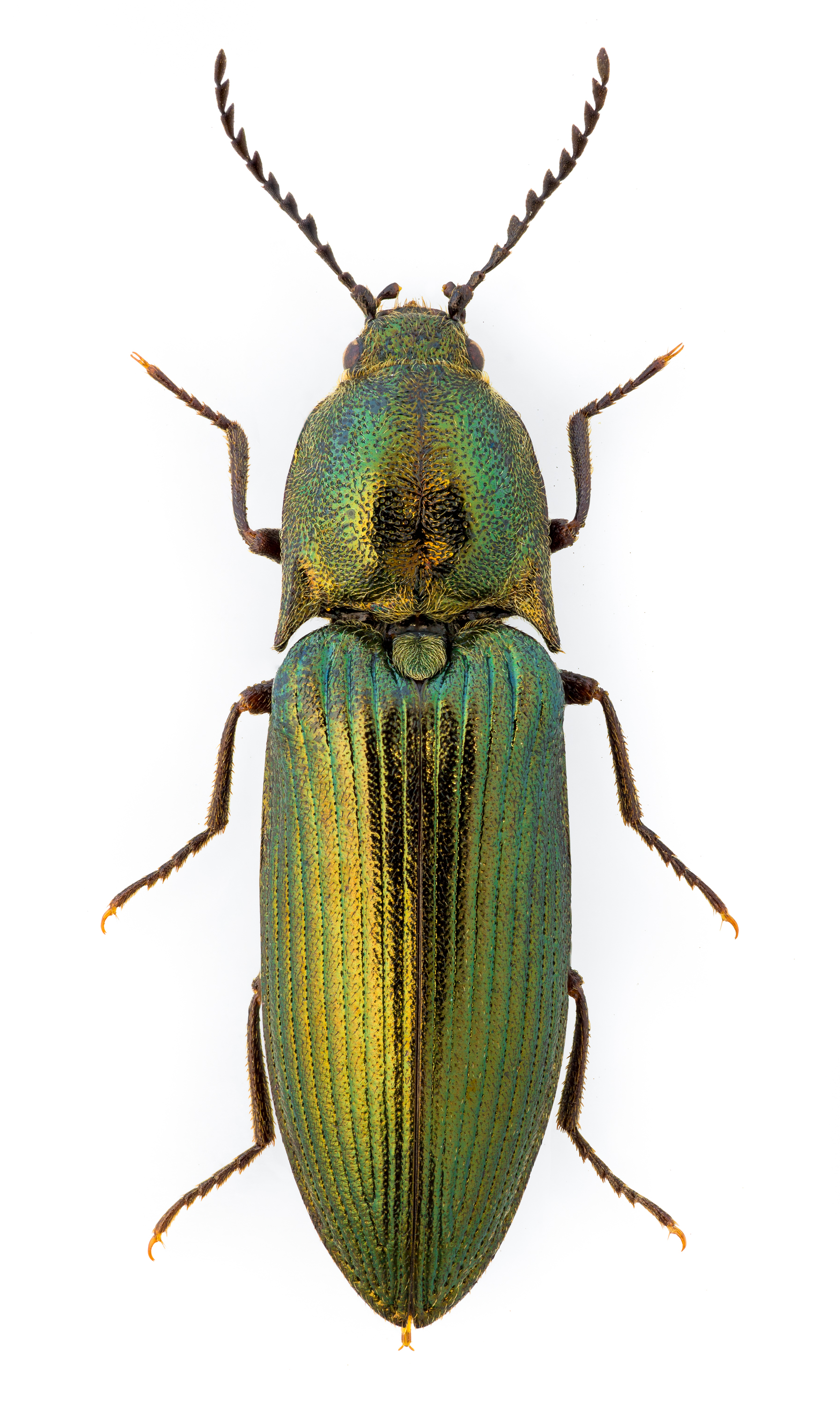 Ctenicera pectinicornis, female